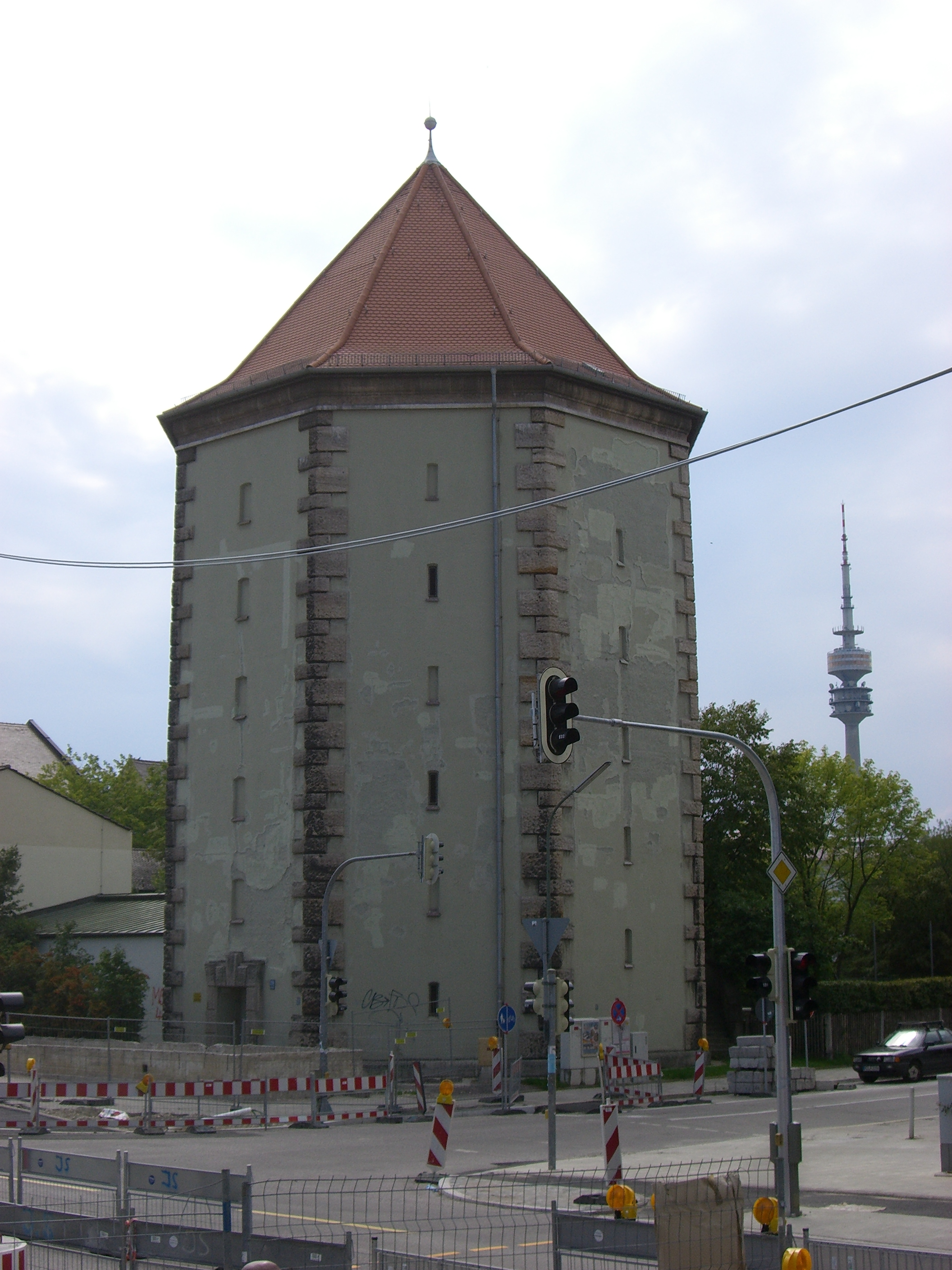 Bunker in Milbertshofen (Schleißheimer Straße 281); im Vordergrund Bauarbeiten auf der Schleißheimer Straße, im Hintergrund der Olympiaturm